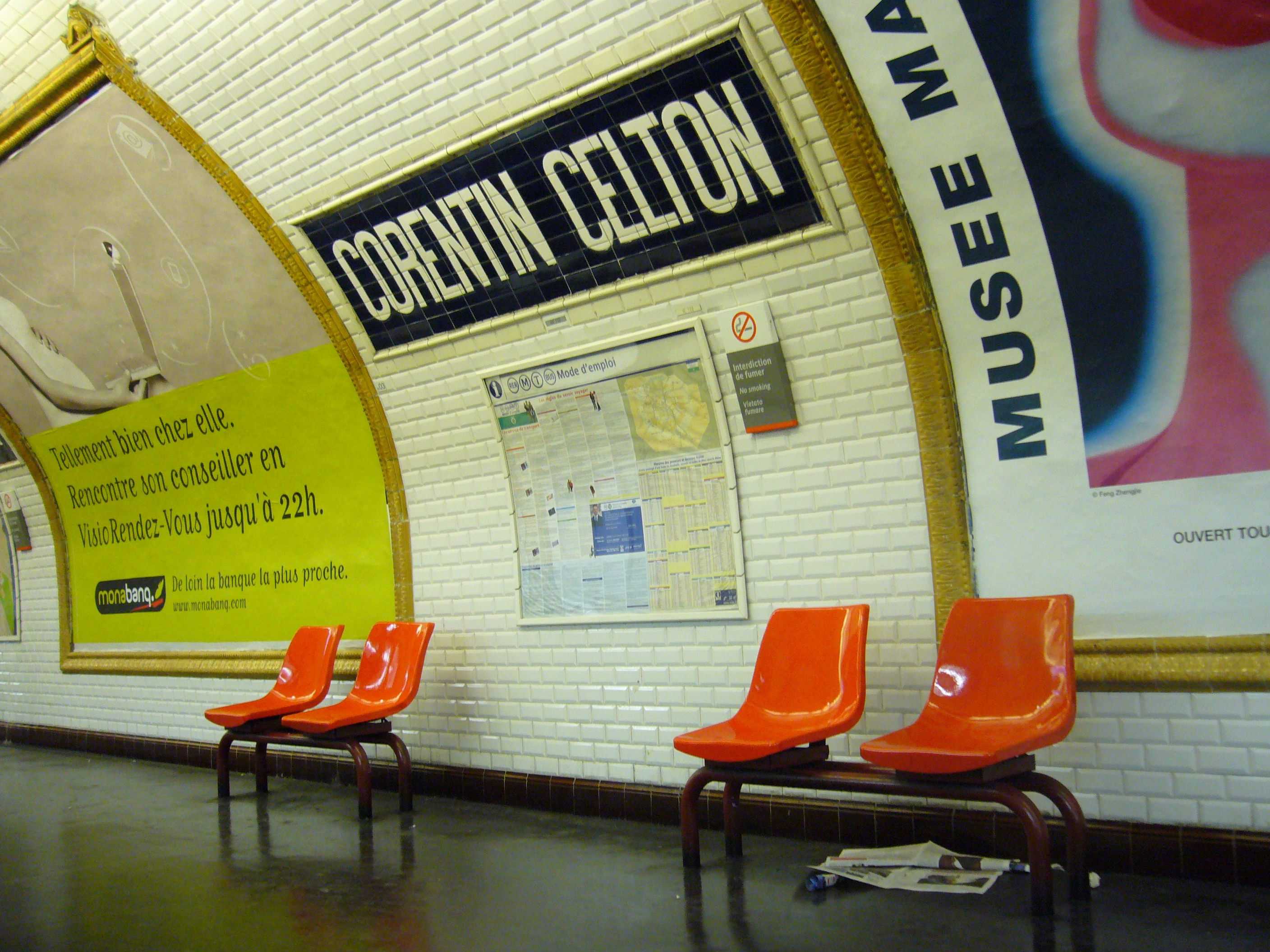 Joseph-André Motte (Français, 1925-2013): siège "Motte", RATP 1973, coque en tôle 10/20 emboutie et émaillée sur rails métalliques, quai de la station Corentin Celton de la ligne 12 du métro de Paris.